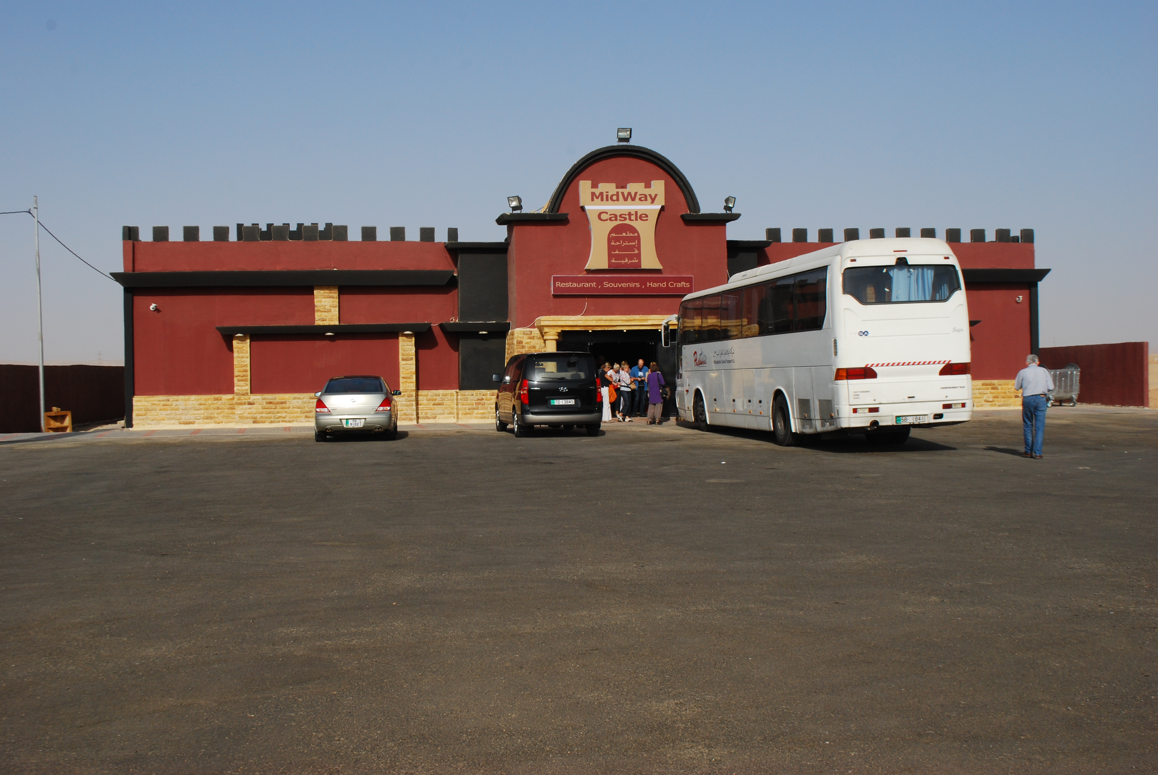 Le "Midway Castle" sur la route n° 15 Amman - Aqaba.